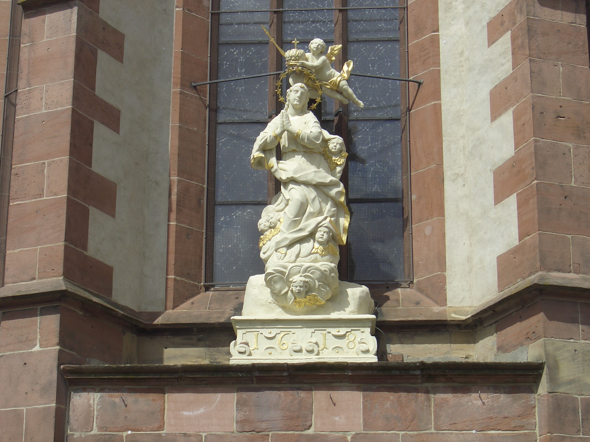 Madonnenstatue vor dem Chor der katholischen Pfarrkirche in Deidesheim